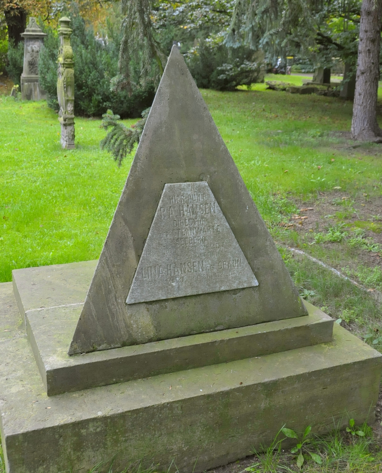 Grabmal des Ehepaars Peter Andreas Hansen auf dem Gothaer Hauptfriedhof